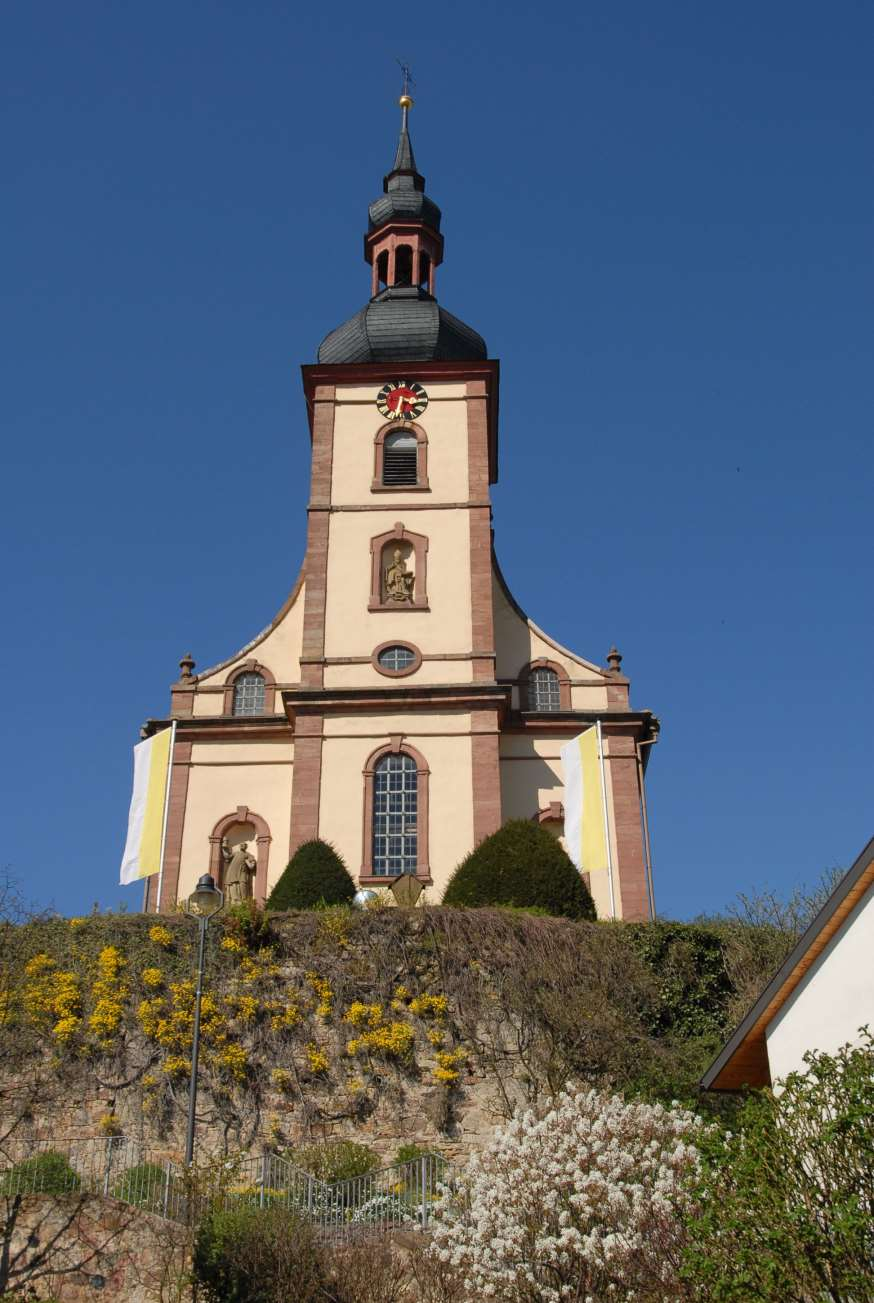 Oberelsbach/Rhoen,Pfarrkirche St.Kilian